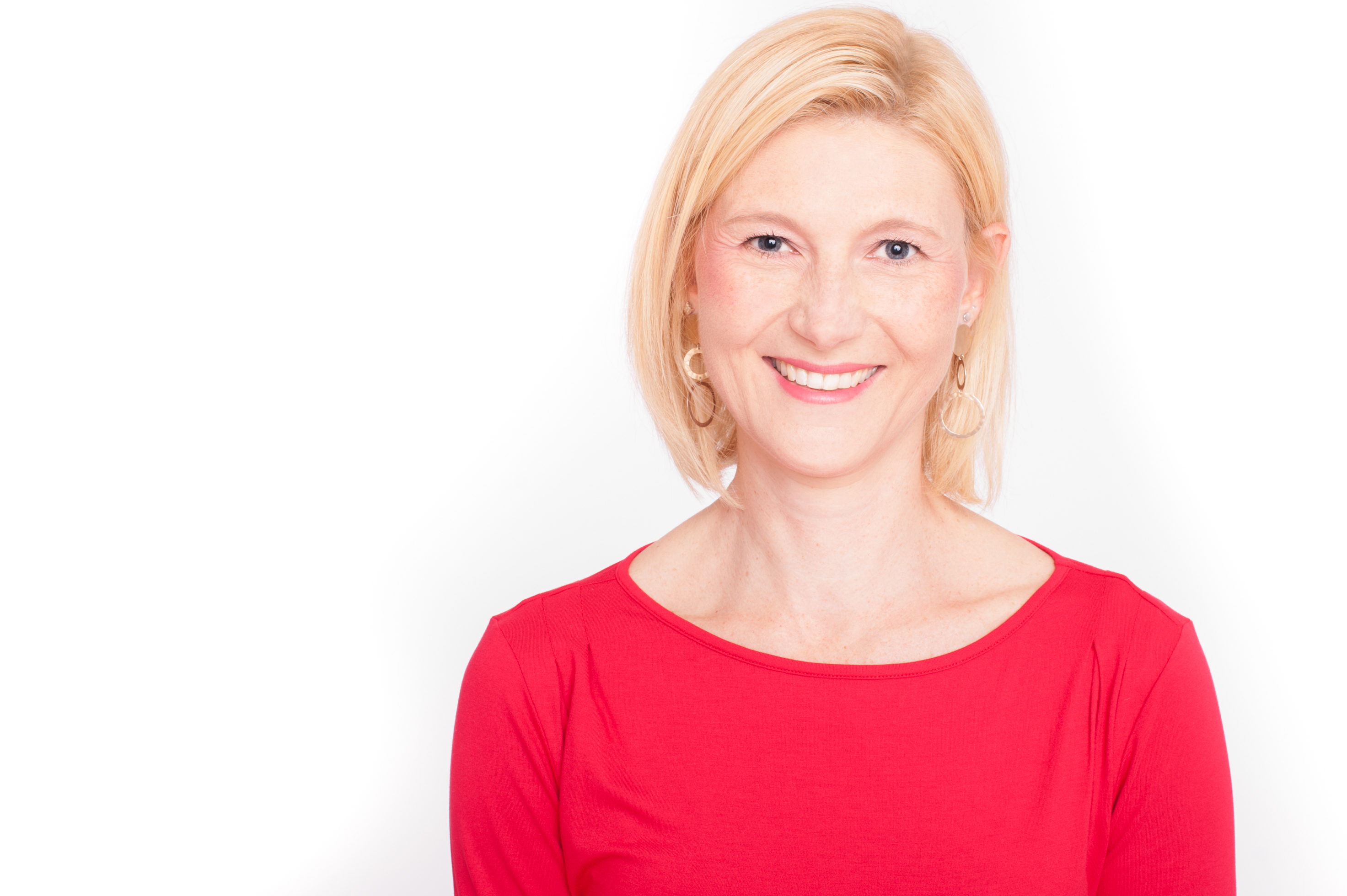 Profilbild Bernadette Arnoldner